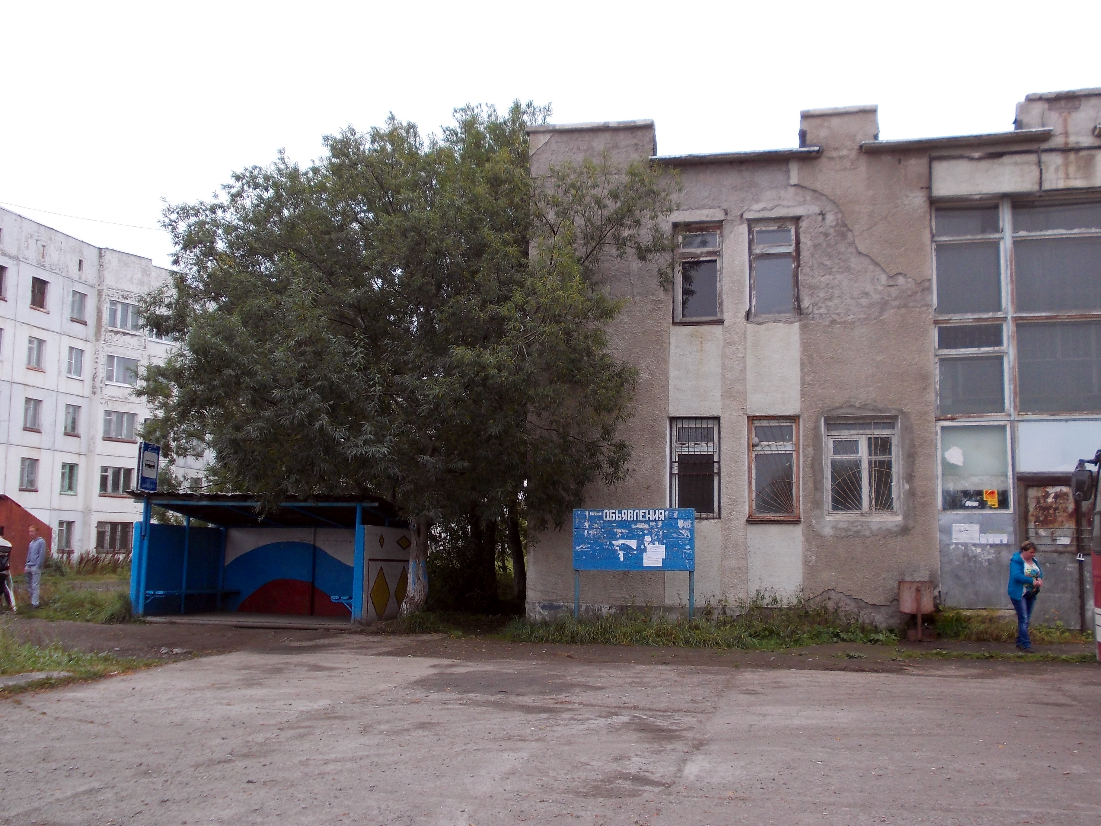 Przystanek autobusowy we wsi Apacza (rejon Ust’-Bolszerecki)